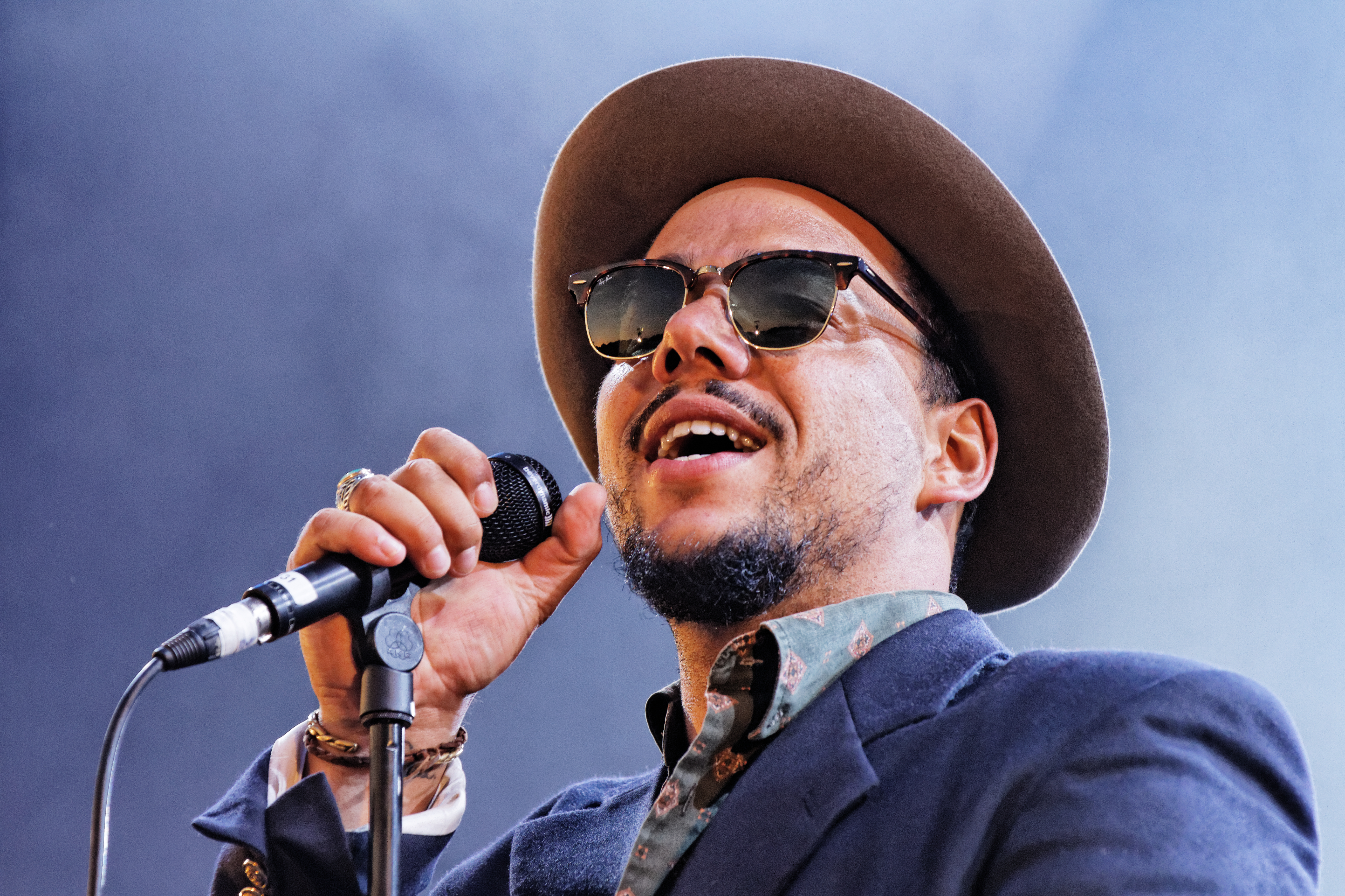 Ben l'Oncle Soul en concert sur la scène Landaoudec lors du festival du bout du Monde à Crozon dans le Finistère (France).